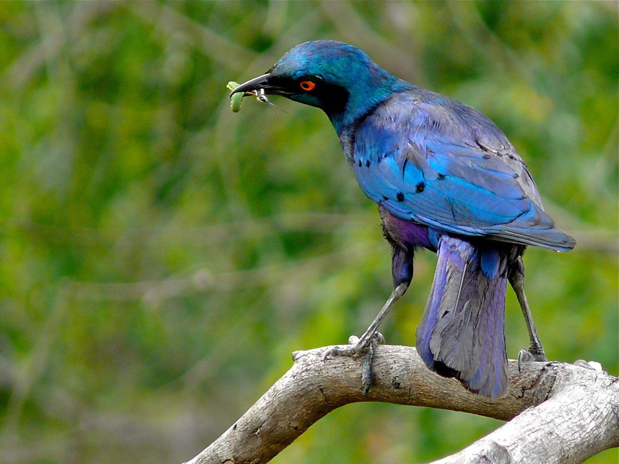 Mahonie Loop, Punda Maria, Kruger NP, SOUTH AFRICA